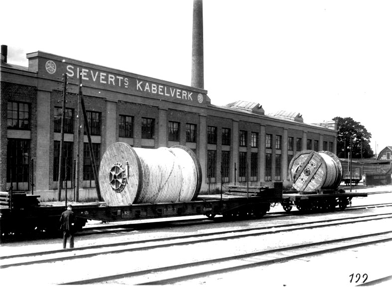 AB Sieverts Kabelverk, Sundbyberg, Sweden, ca 1910